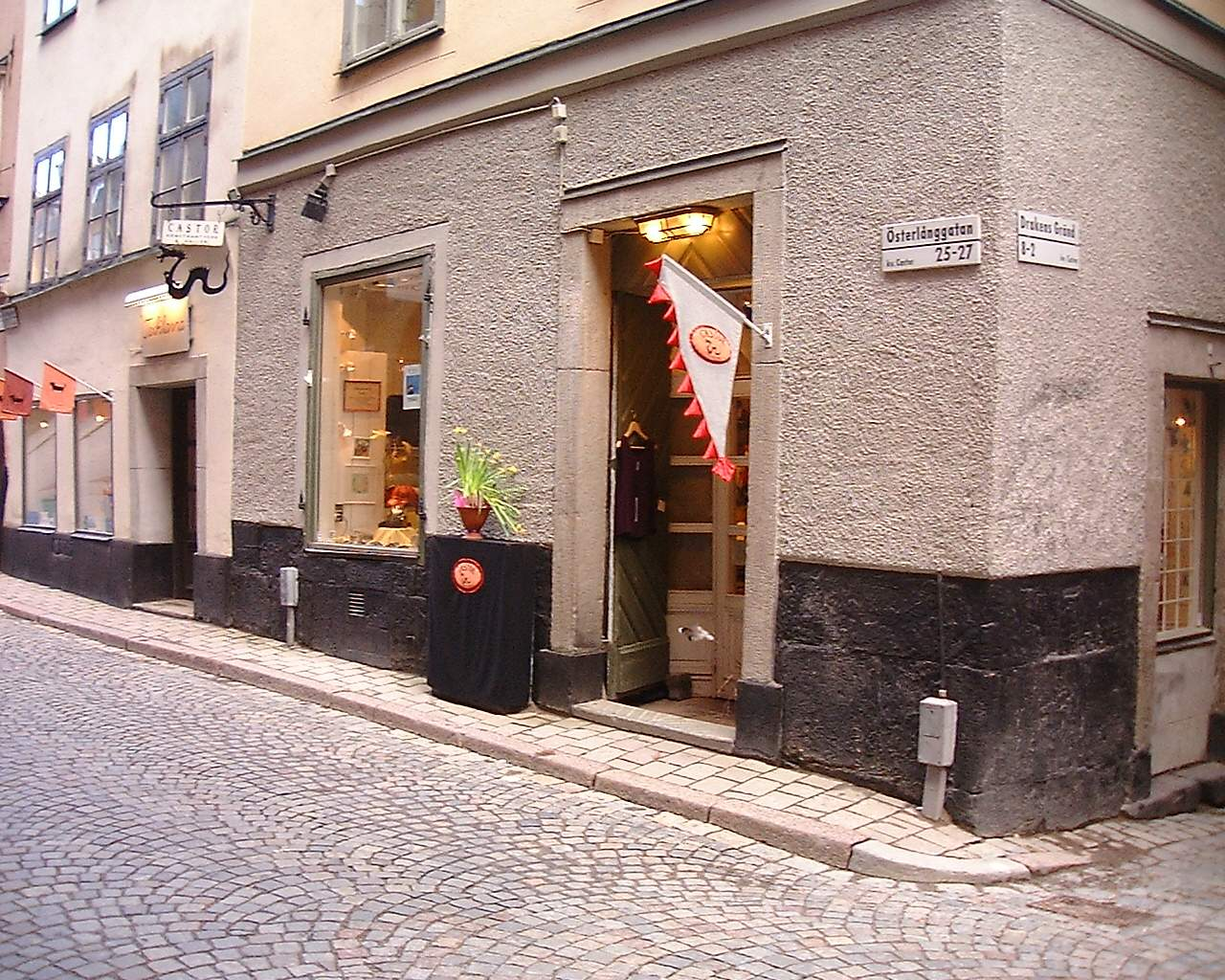 27, Östralånggatan, Gamla stan, Stockholm.